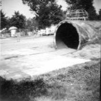 Bundesgartenschau 1957 in Köln - Kindergarten